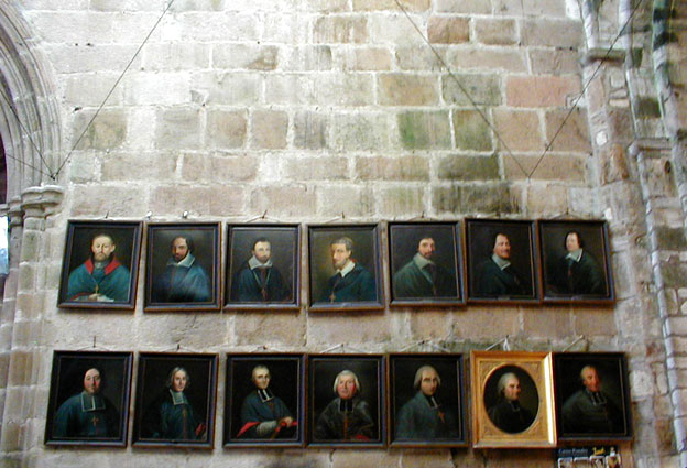 Landreger. Eskibien. Poltrejoù